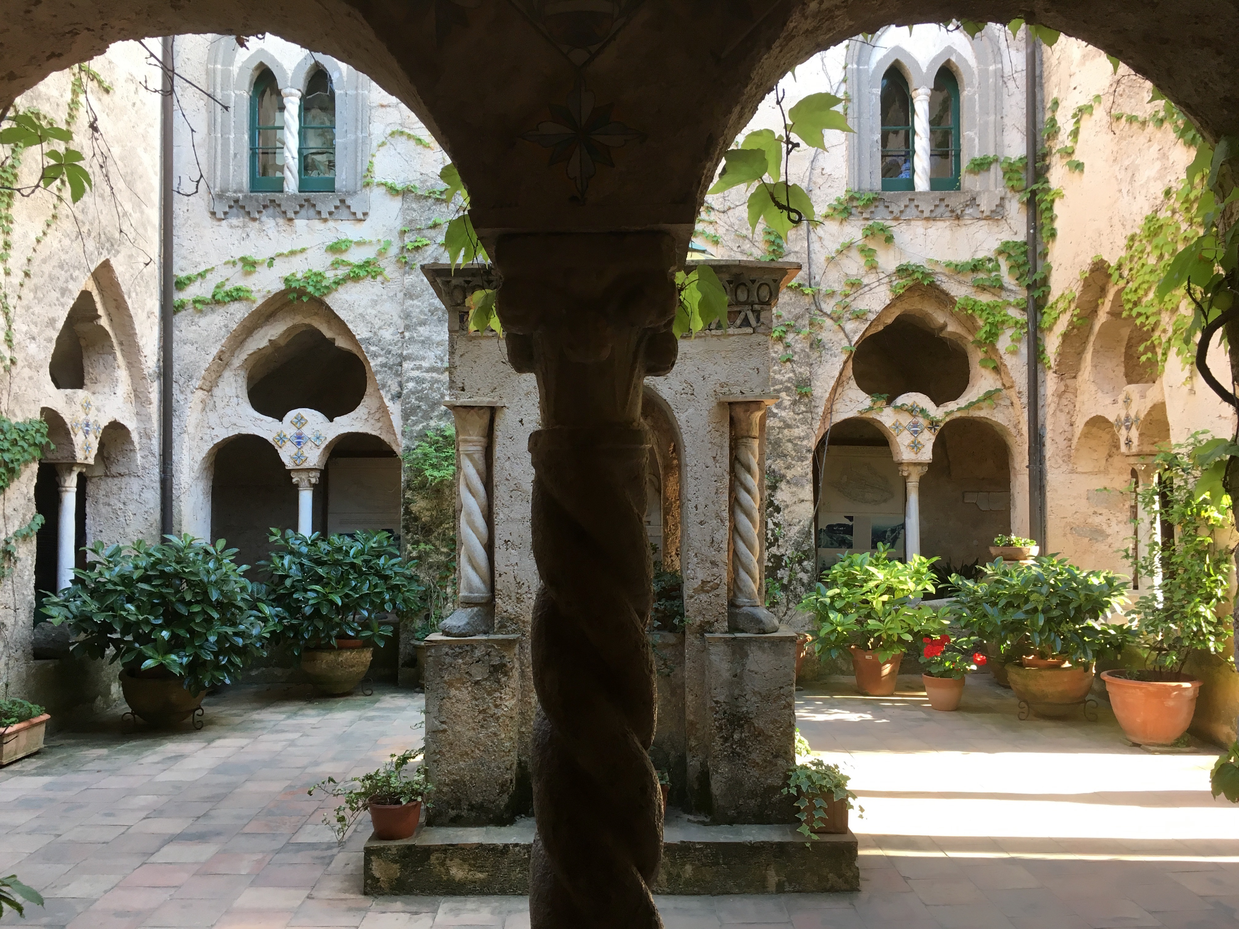 Villa Cimbrone (Ravello). Claustro.